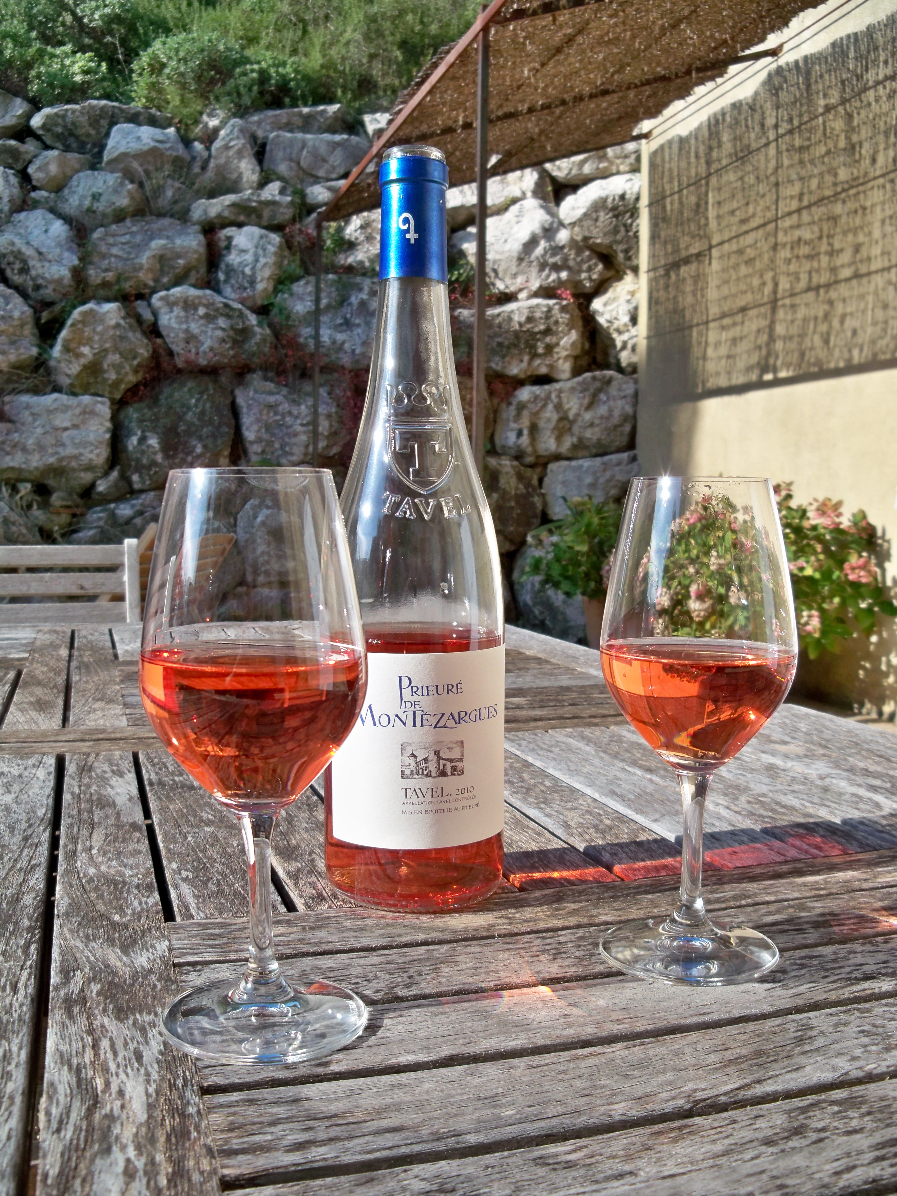 Bouteille de Prieuré de Montézargues